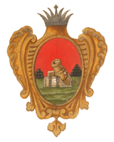 Герб для знамени Брянского ландмилицкого полка